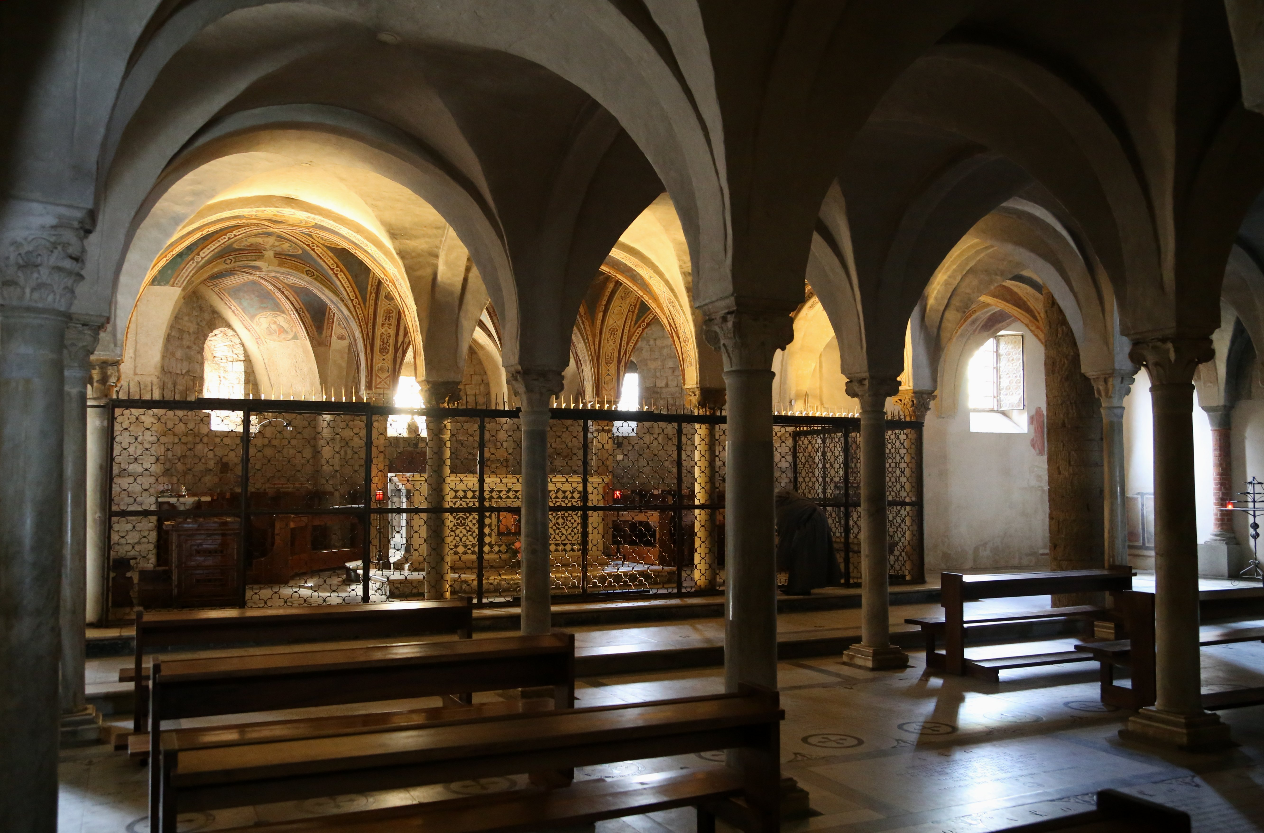 Krypta, San Miniato al Monte, Florenz